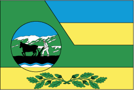 Прапор Великого Бичкова до 2010 року